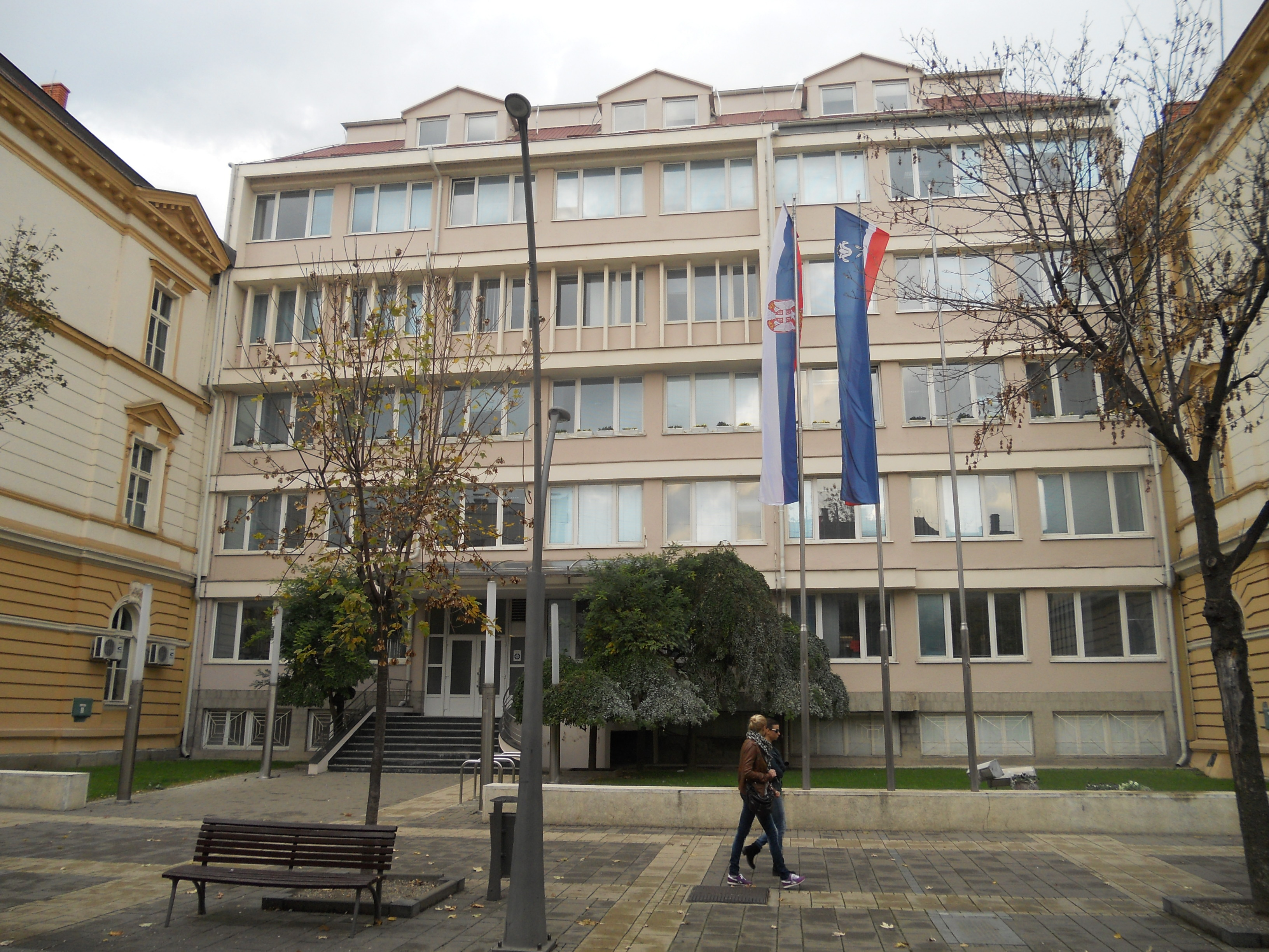 аутор Дарко Гајић